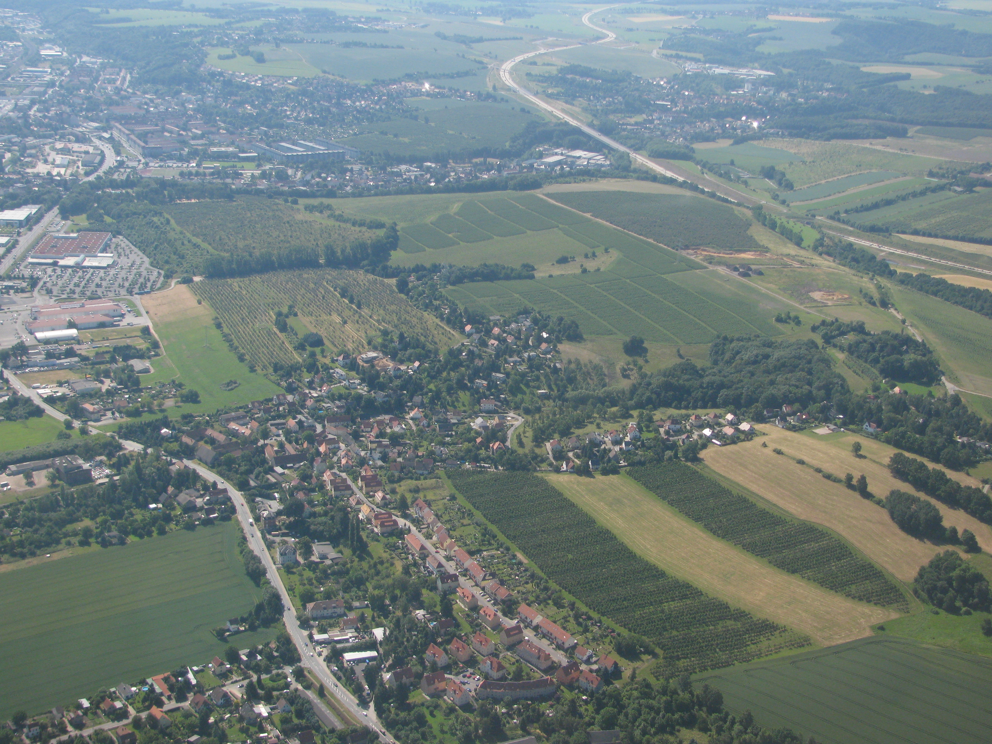 Heidenau-Gommern Luftbild